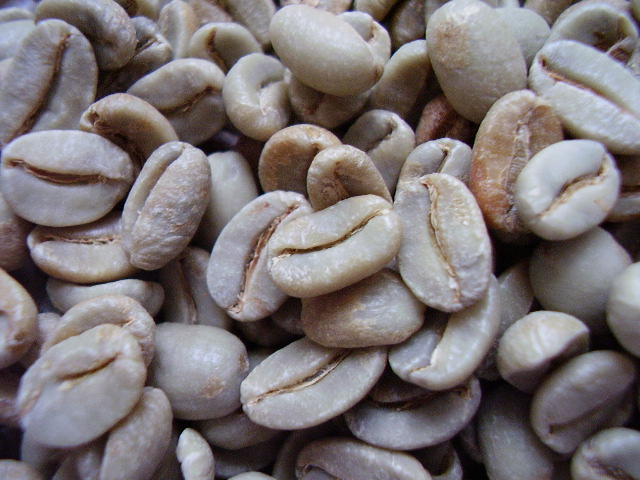 Rohkaffee-Bohnen, Arabica, Minas Kava